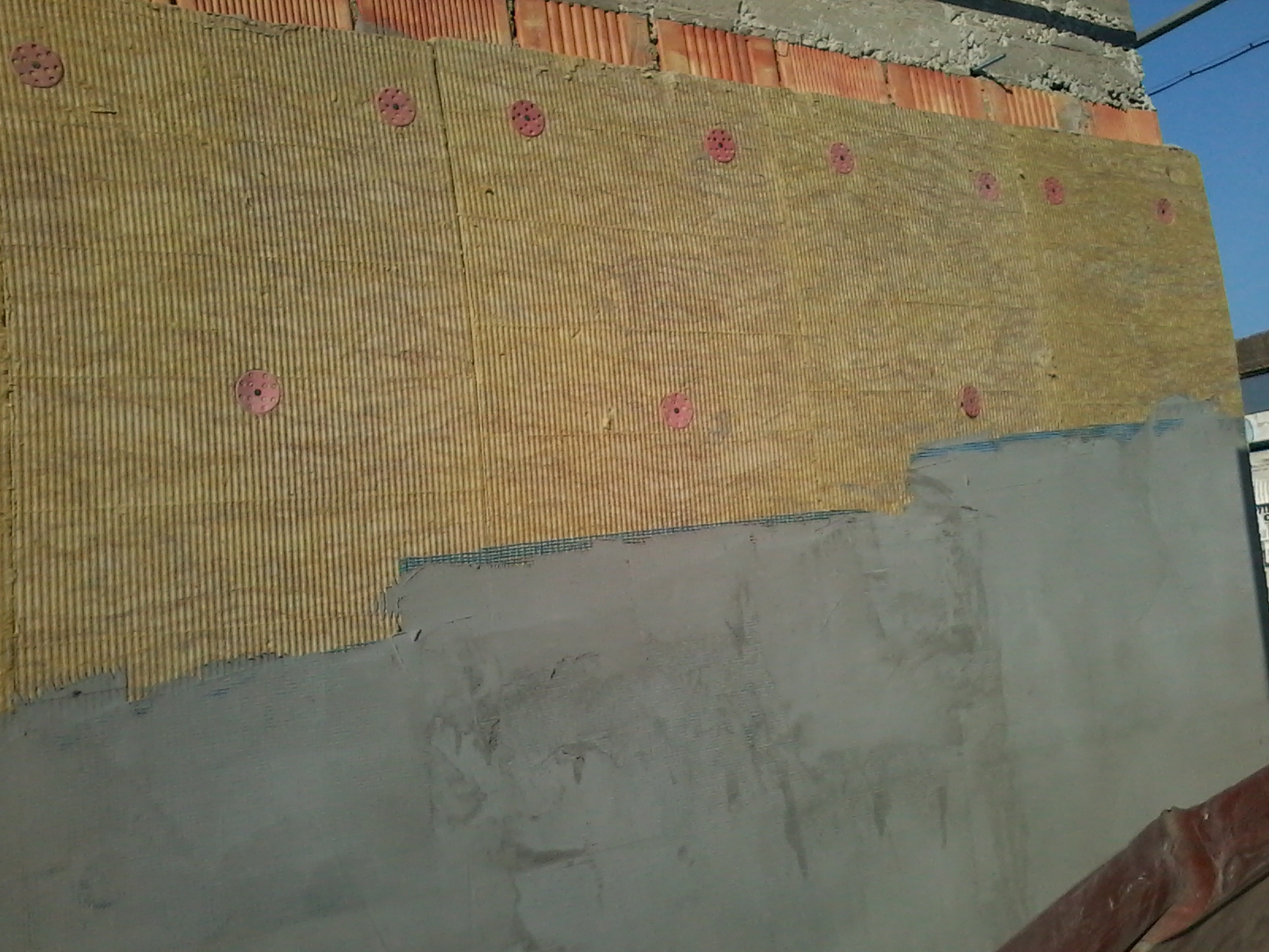 Знято мобілкою Самсунг